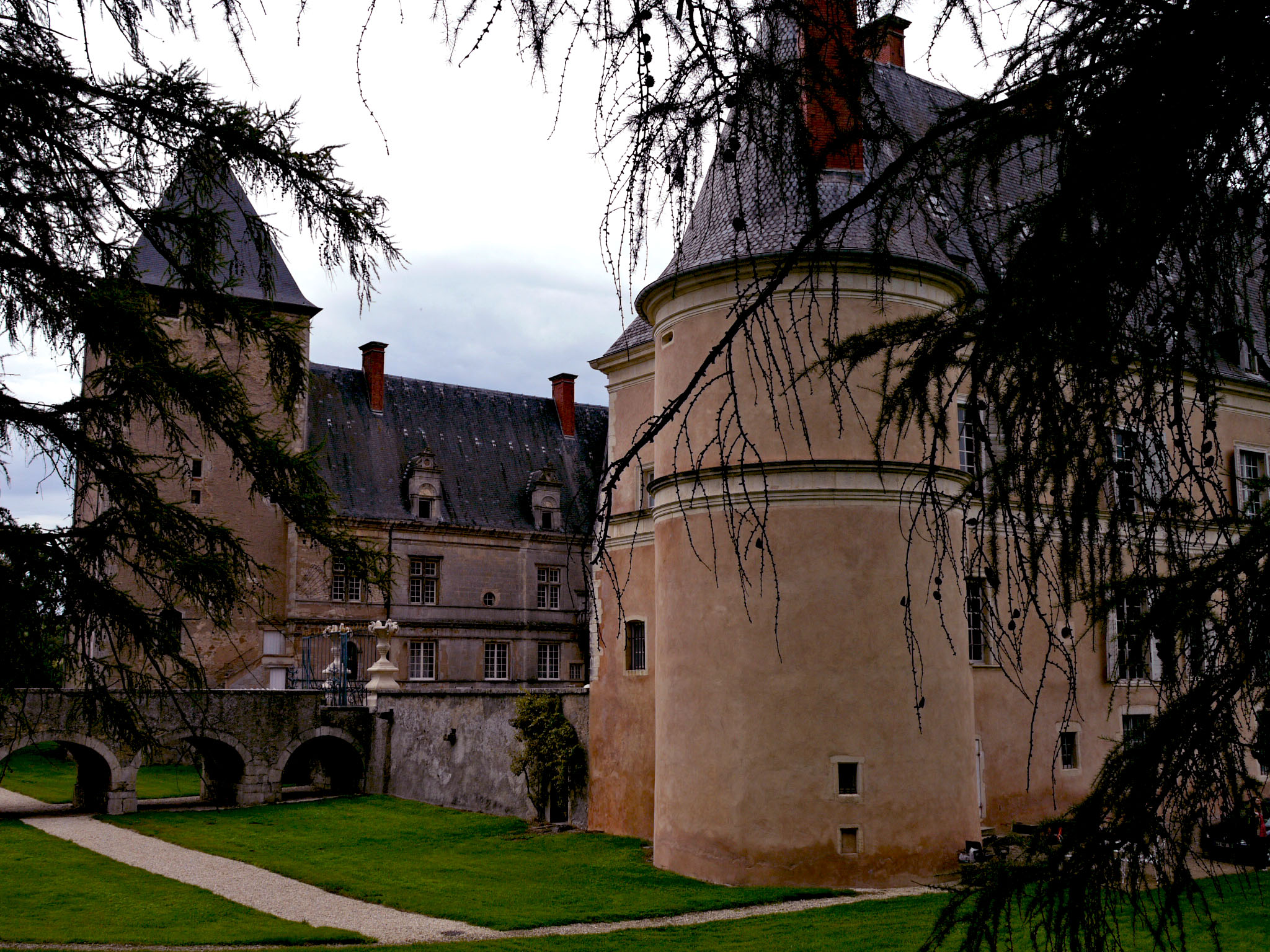 Douves asséchées du château de Fléville